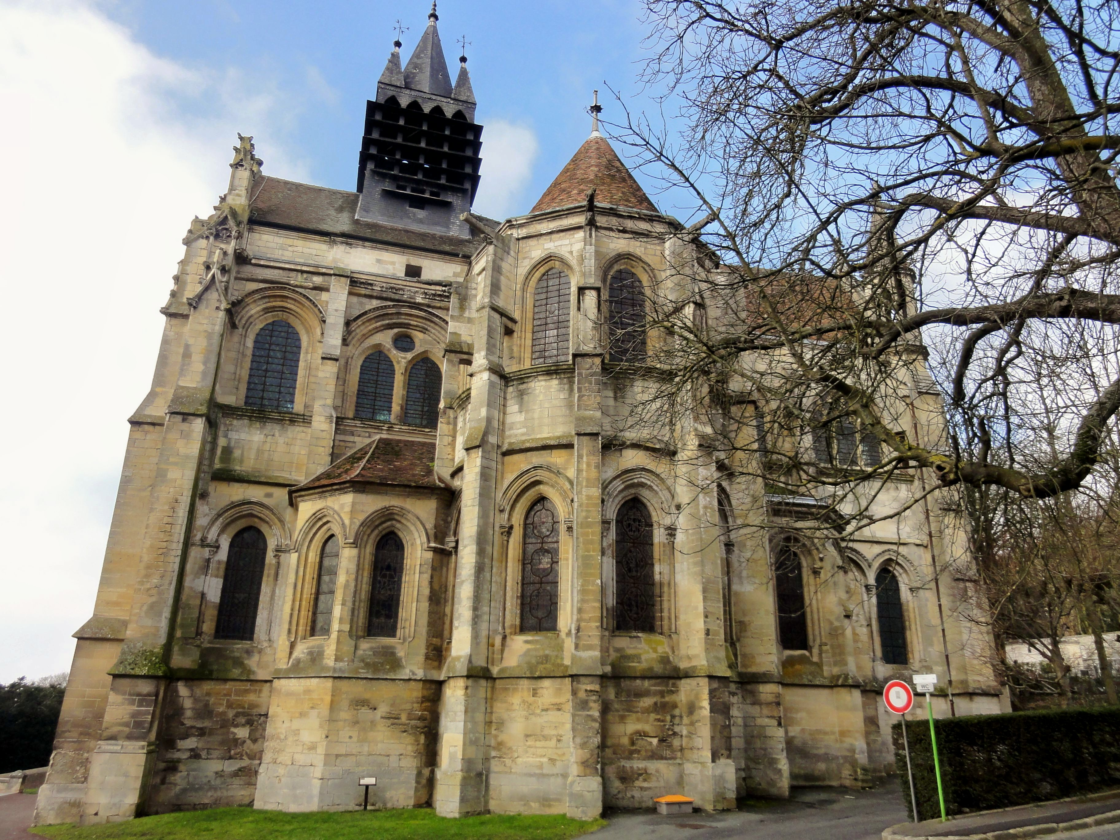 Façade du chevet.